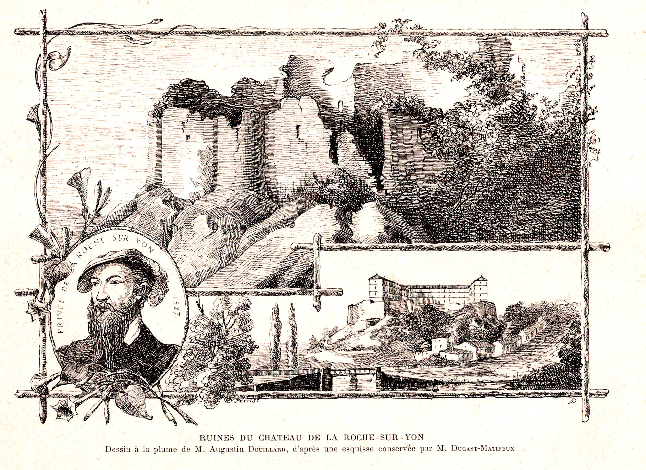 Ruines du château de La Roche-sur-Yon. Dessin à la plume de M. Augustin Douillard, d'après une esquisse conservée par M. Dugast-Matifeux, in L. Rousseau (abbé), Saint-Lienne et son prieuré, La Roche-sur-Yon, Raoul Ivonnet, imprimeur-éditeur, 1898, p. 97.